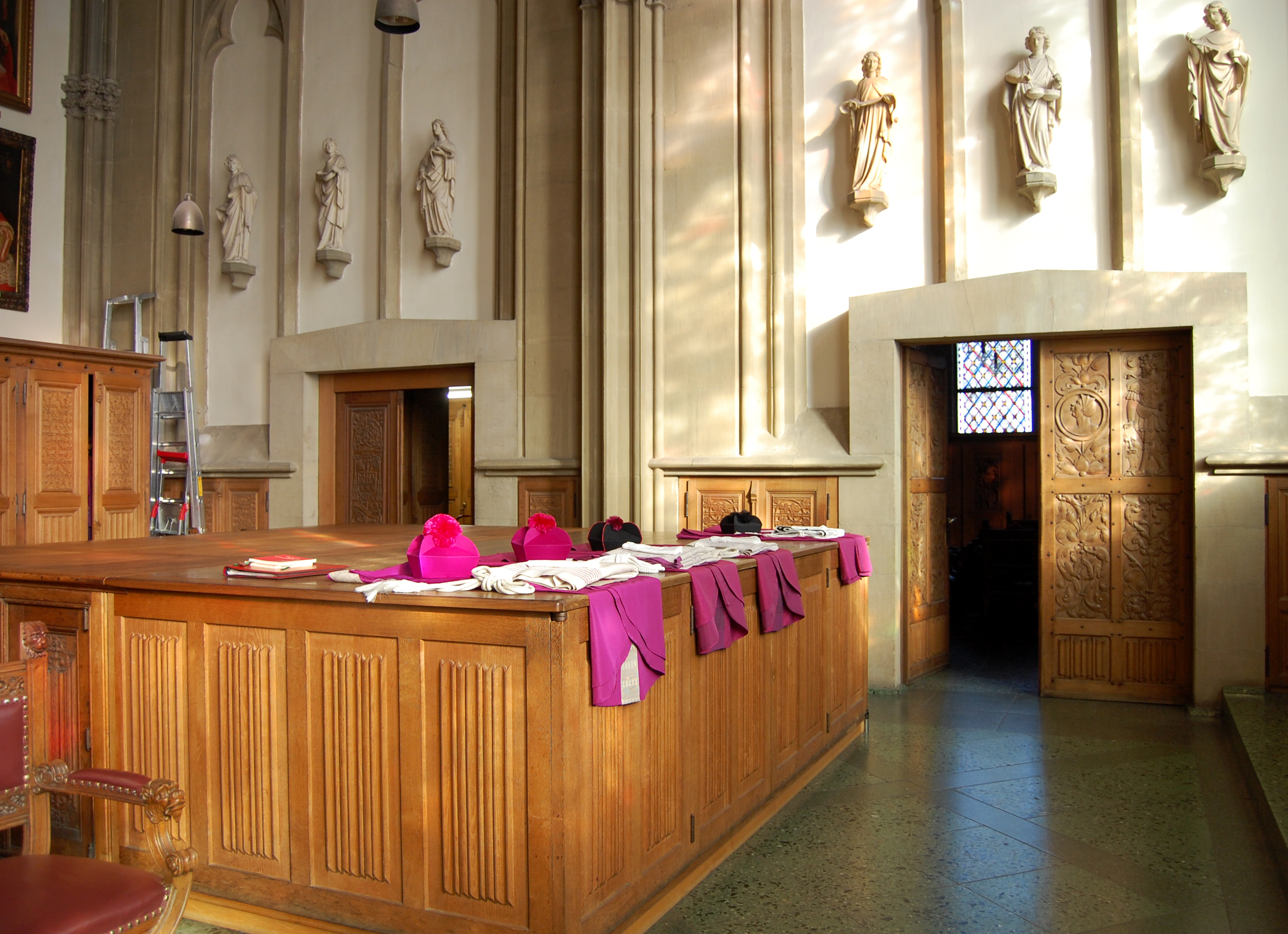 Sakristei Dom Köln